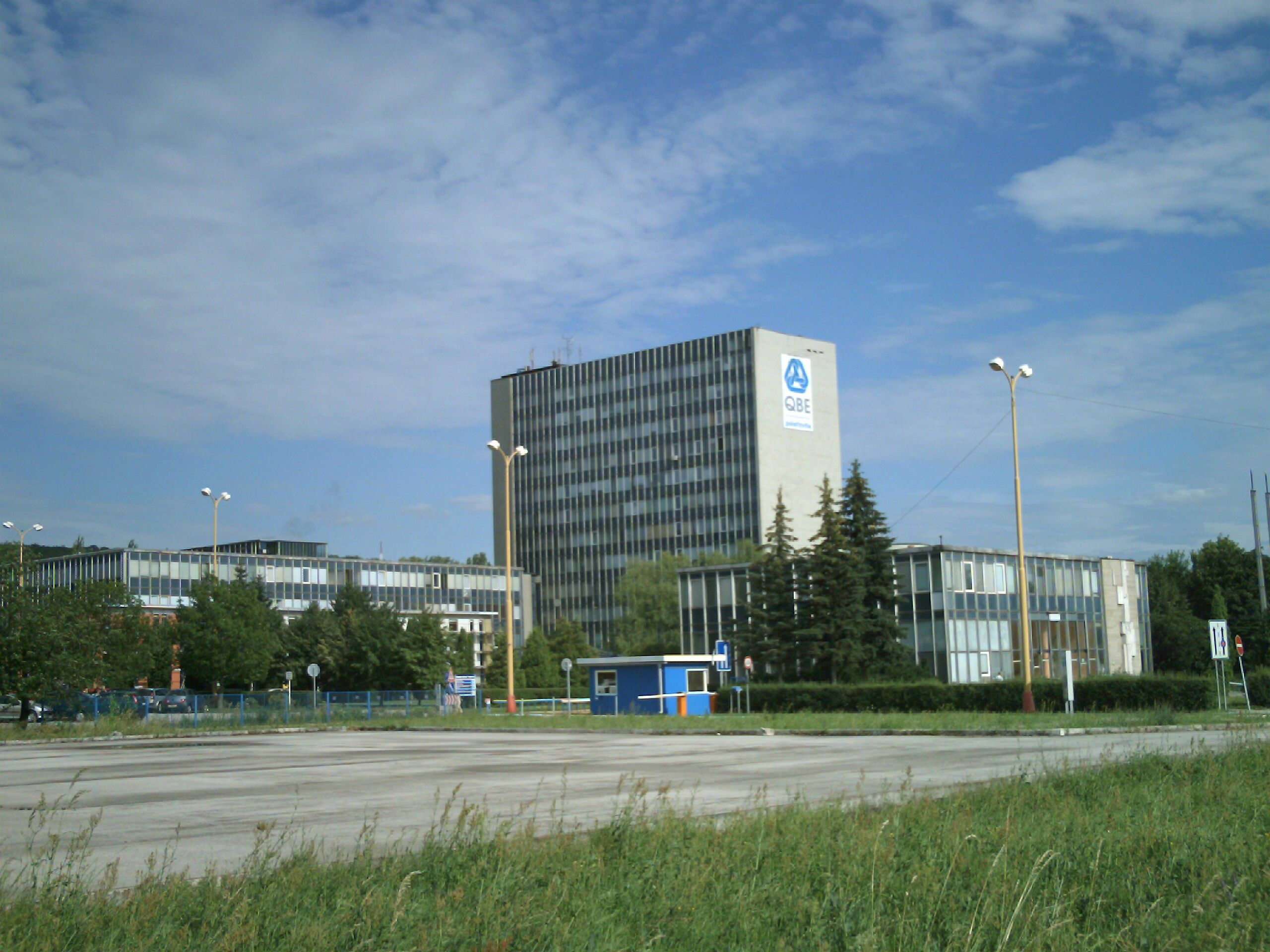 Hospital in Kosice Saca, Slovakia